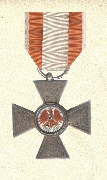 Eigen scan bewerkt met paint. Robert Prummel 15 jun 2006 02:40 (CEST)